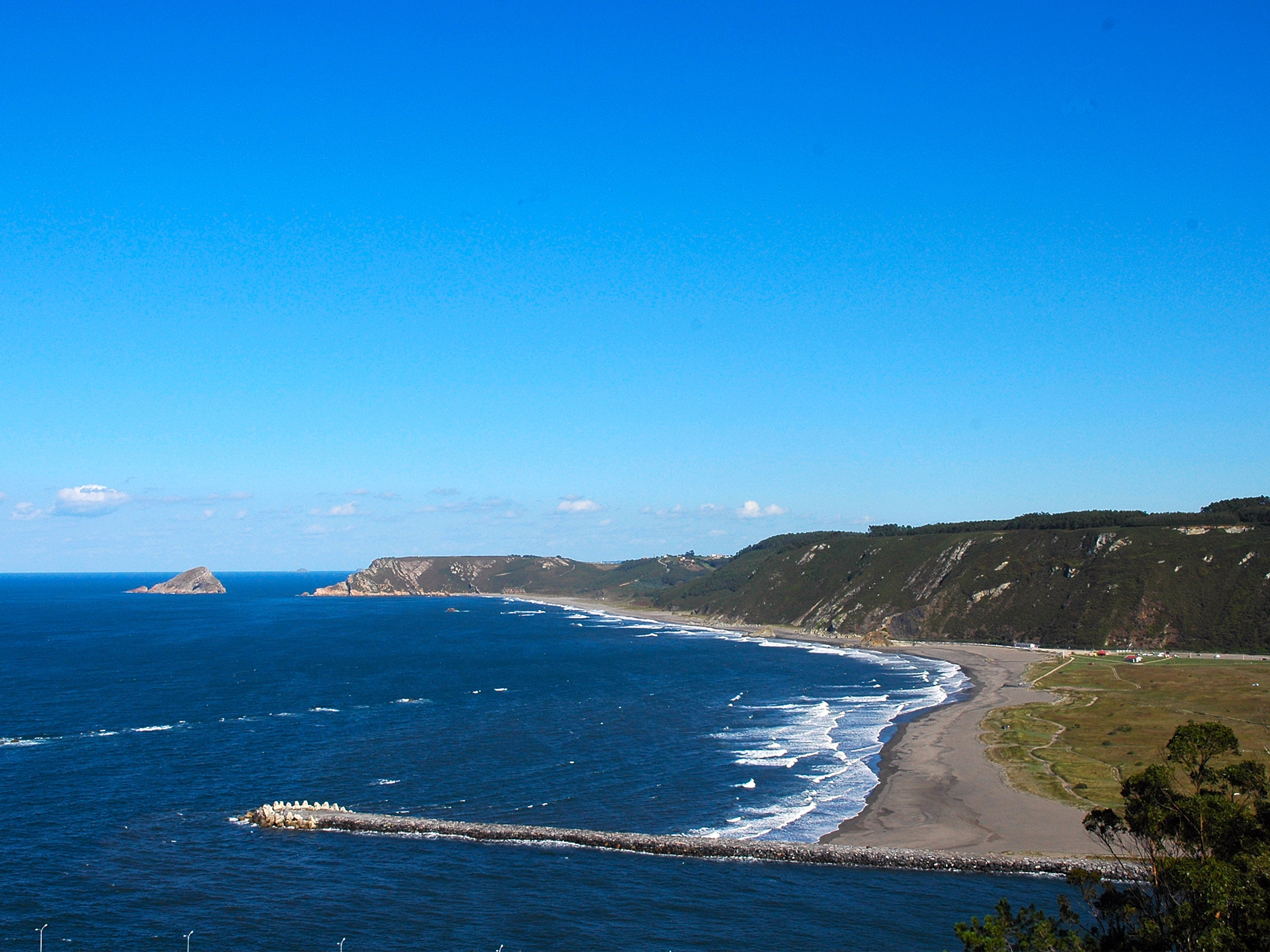 Playa de los Quebrantos Autor: Ramón Noriega